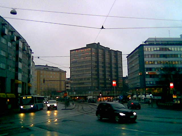 Kurvi area in Helsinki, Finland